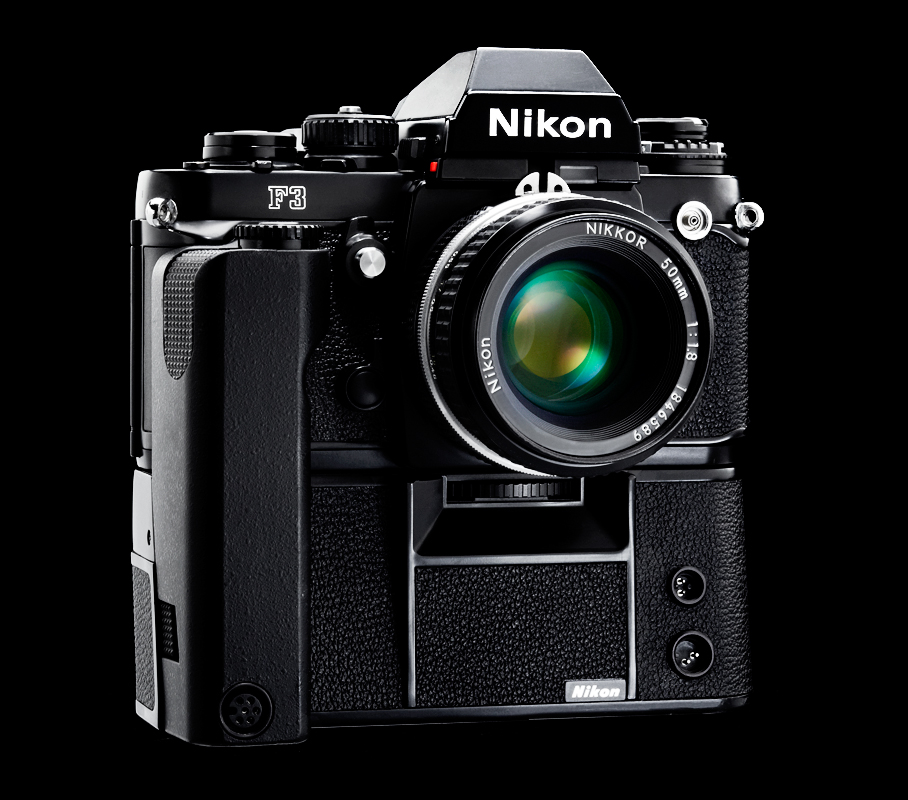 Nikon F3 Camera Giugiaro Design